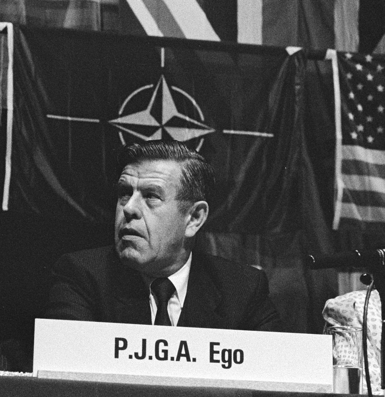 Collectie / Archief : Fotocollectie Anefo Reportage / Serie : [ onbekend ] Beschrijving : Landelijke bijeenkomst OSL in Apeldoorn; CdK in Friesland Wiegel Datum : 28 september 1985 Locatie : Apeldoorn, Gelderland Trefwoorden : Ontvangsten, bijeenkomsten Fotograaf : Bogaerts, Rob / Anefo Auteursrechthebbende : Nationaal Archief Materiaalsoort : Negatief (zwart/wit) Nummer archiefinventaris : bekijk toegang 2.24.01.05 Bestanddeelnummer : 933-4381